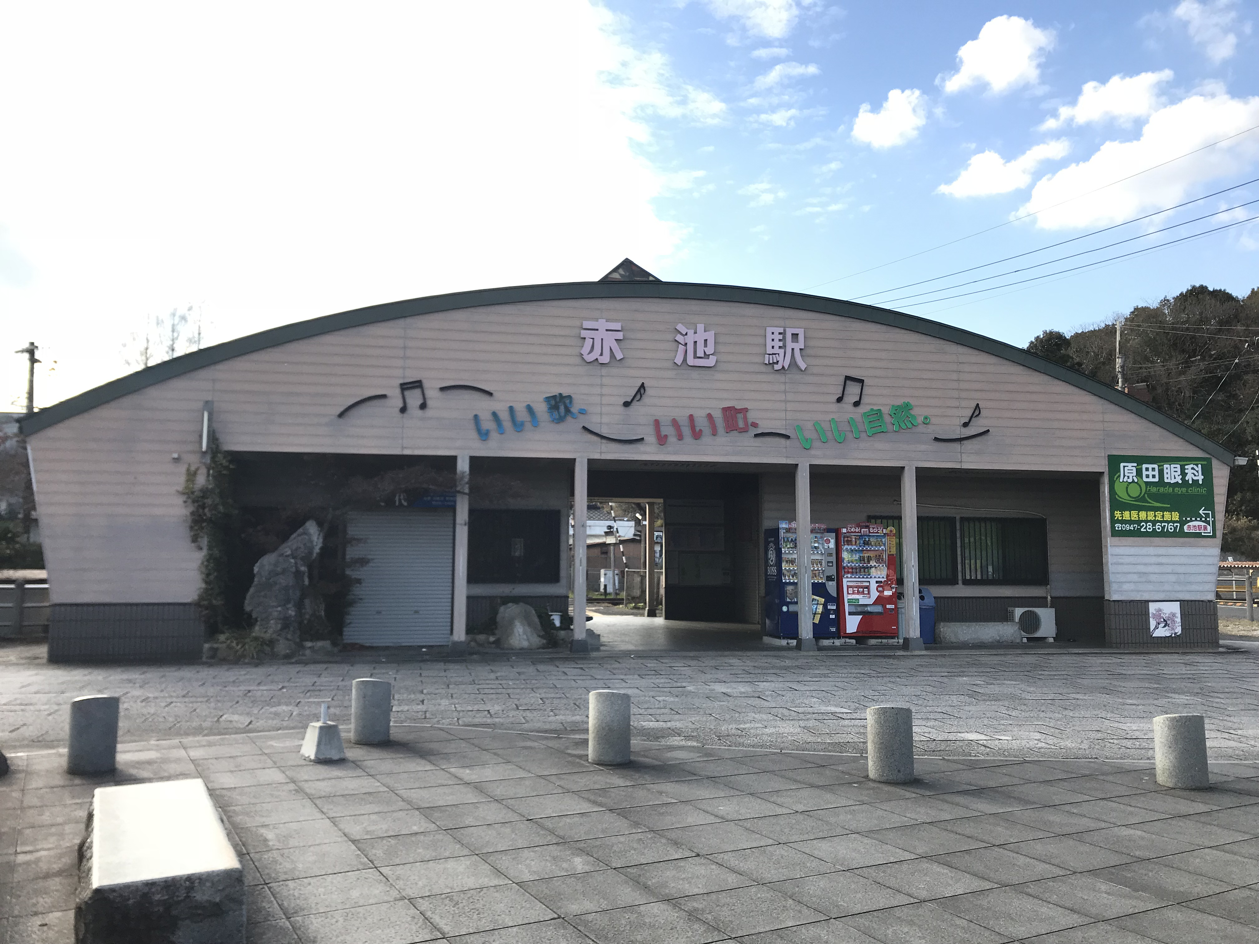 赤池駅の駅舎